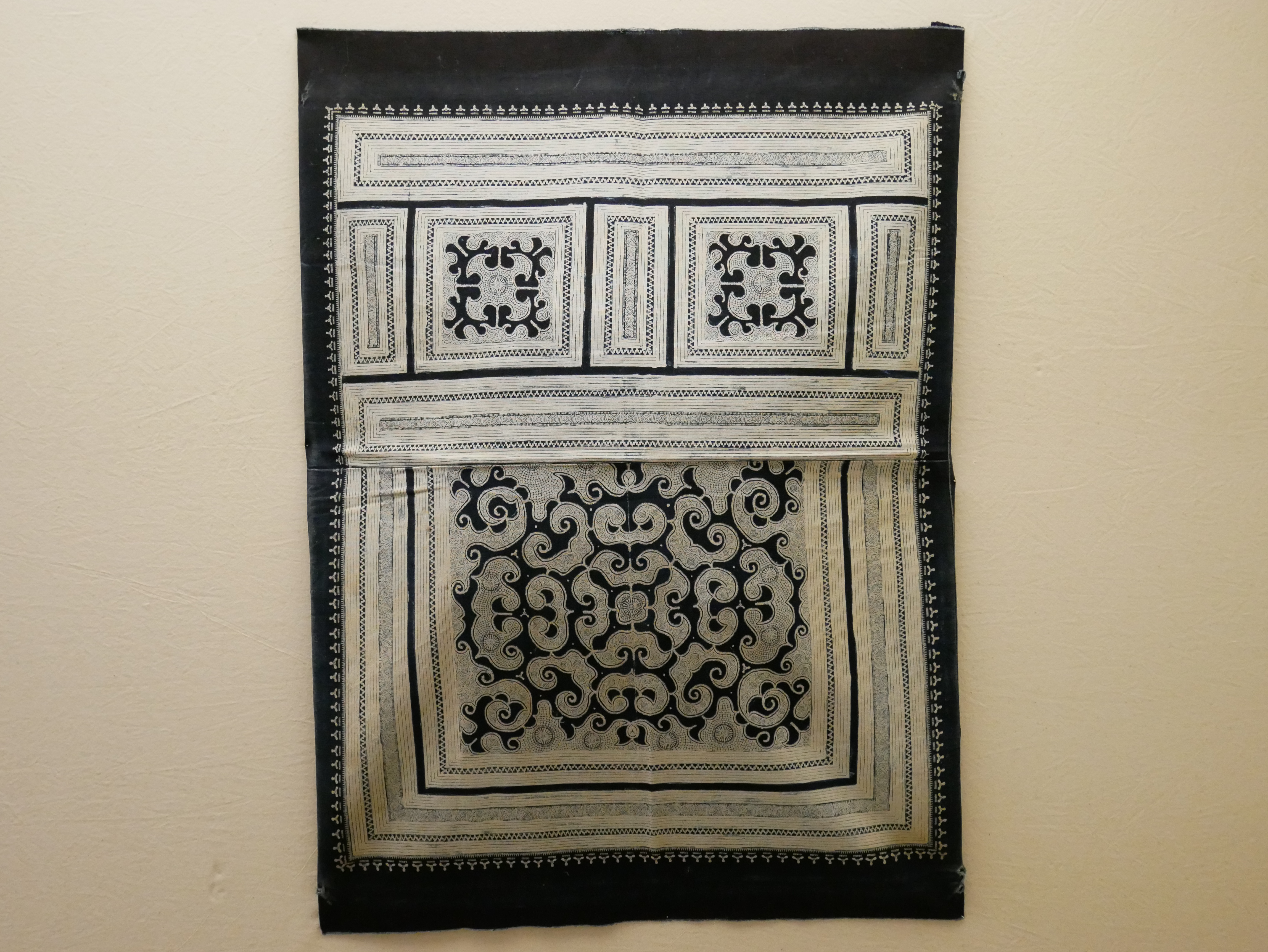 苗族傳統蠟染童帽，臺北市北投區新北投次分區林泉里